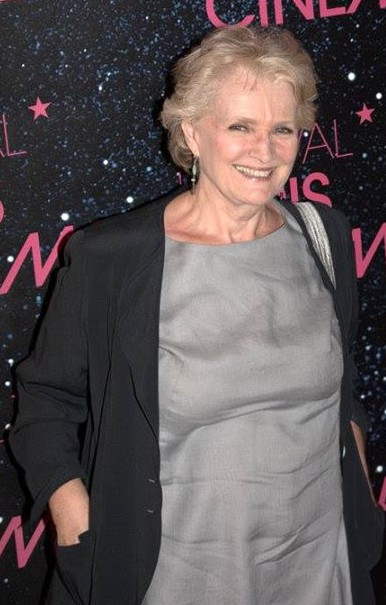 Marie-Christine Barraut à l'avant-première du film "Le Grand méchant loup".